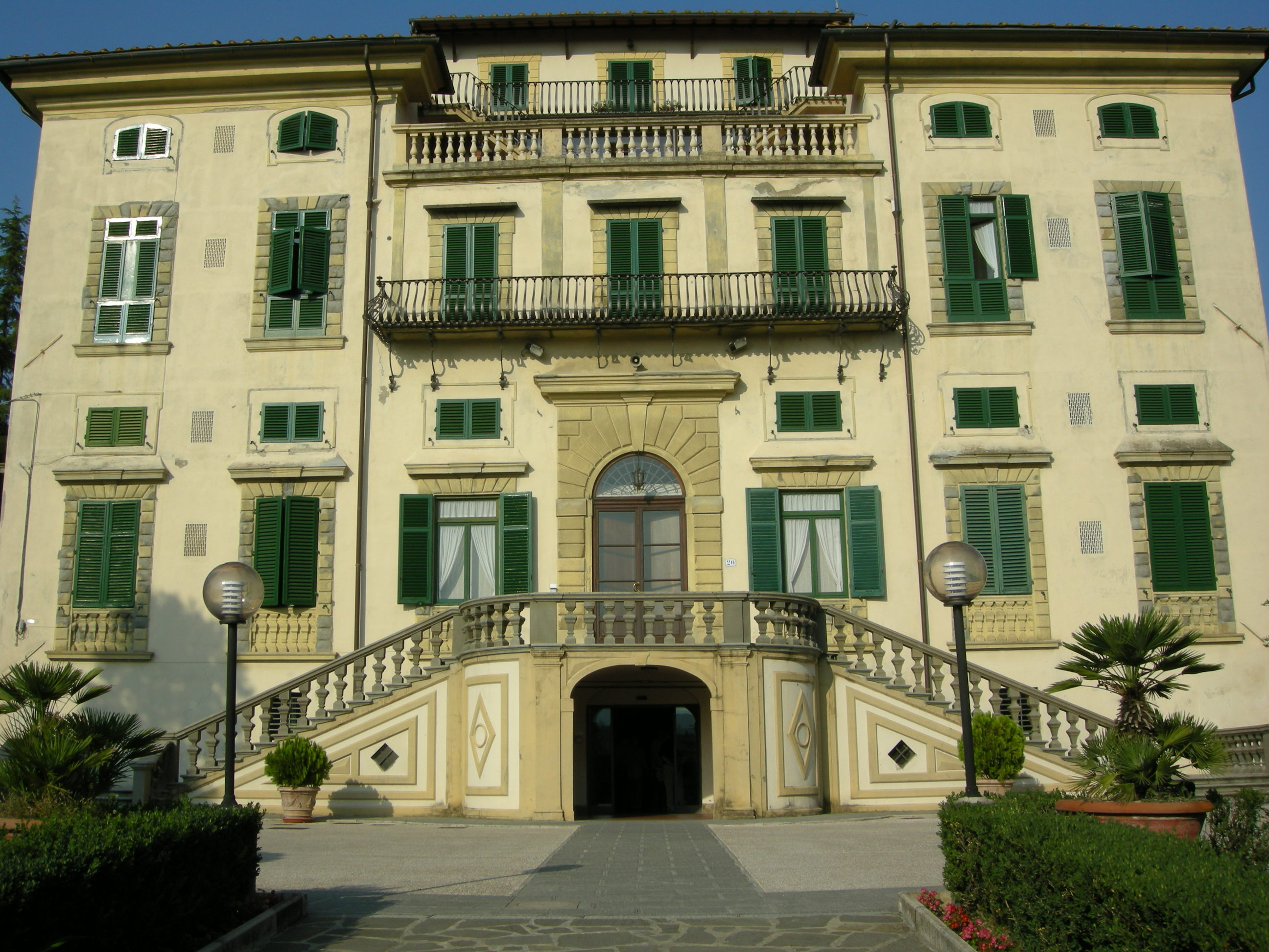 Villa La Nerlaia